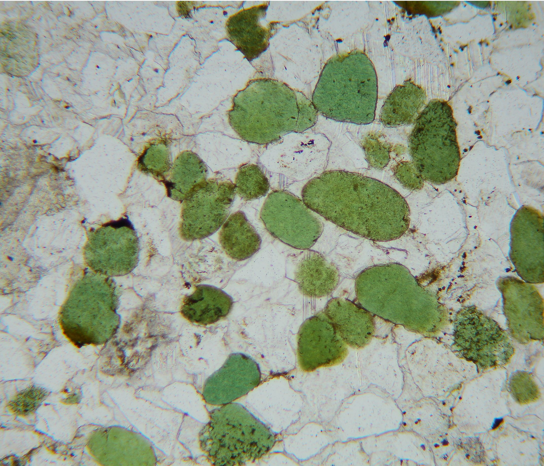 Glaukonit (Pellets) in einem mikritisch gebundenen Kalksandstein (Dünnschliff). Faltenmolasse, Bayern.